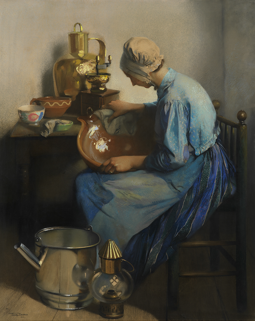 De schoonmaakster (Firmin Baes, 1910); collection: Musea Brugge - Groeningemuseum